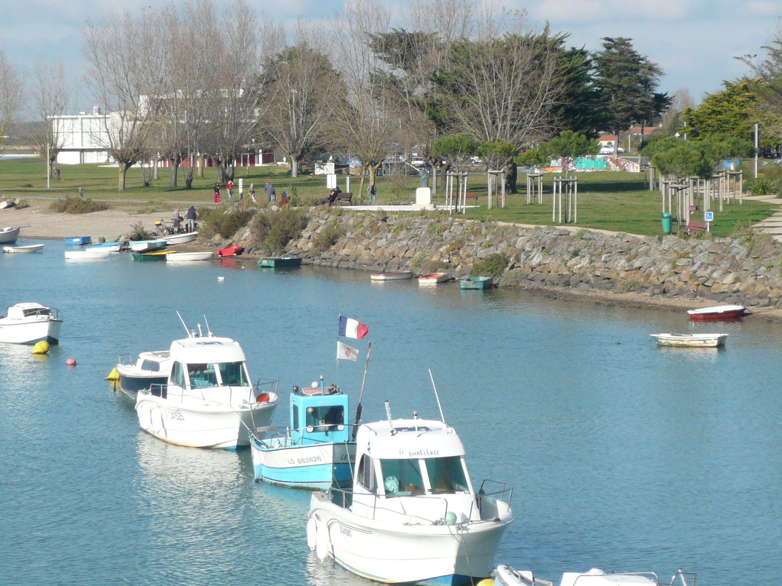 Saint-Gilles-Croix-de-Vie dans le département de la Vendée (France) : Le fleuve de la Vie et la promenade Pierre Garcie-Ferrande côté Saint-Gilles vus depuis la passerelle cyclo-piétonne « André Bénéteau » en octobre 2008.